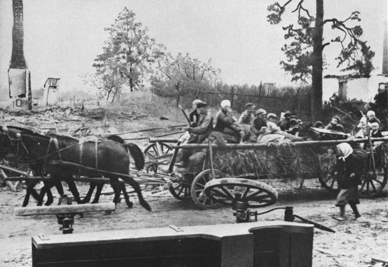 Ostpreussischer Flüchtlingstreck 1945